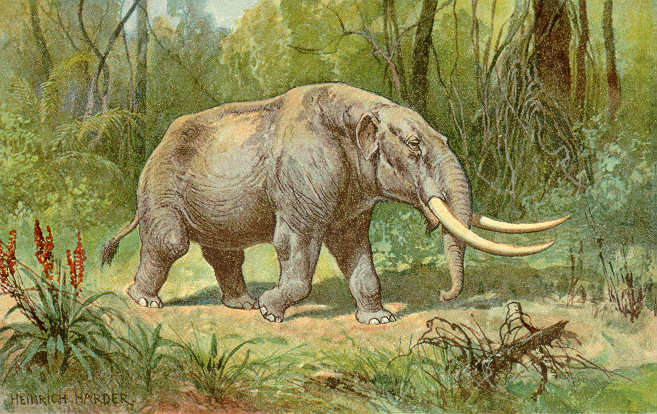 Mastodon